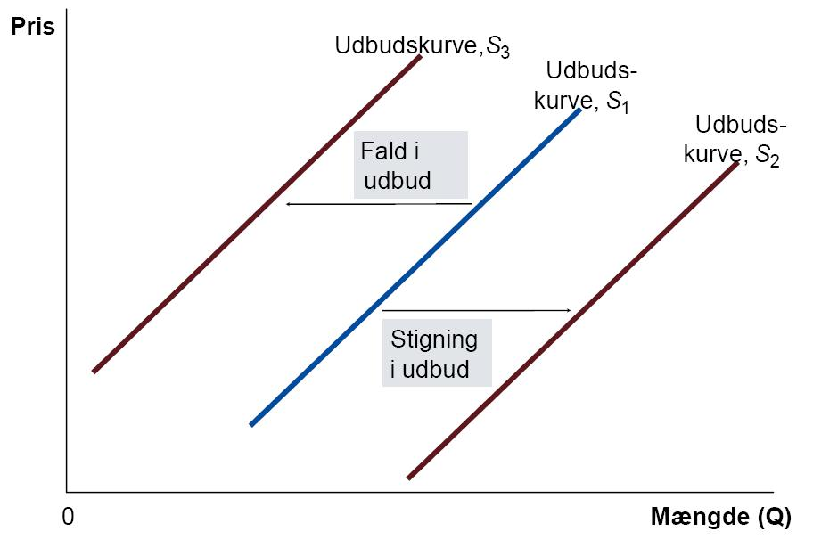 Eksempler på hhv. fald og stigning i udbud.